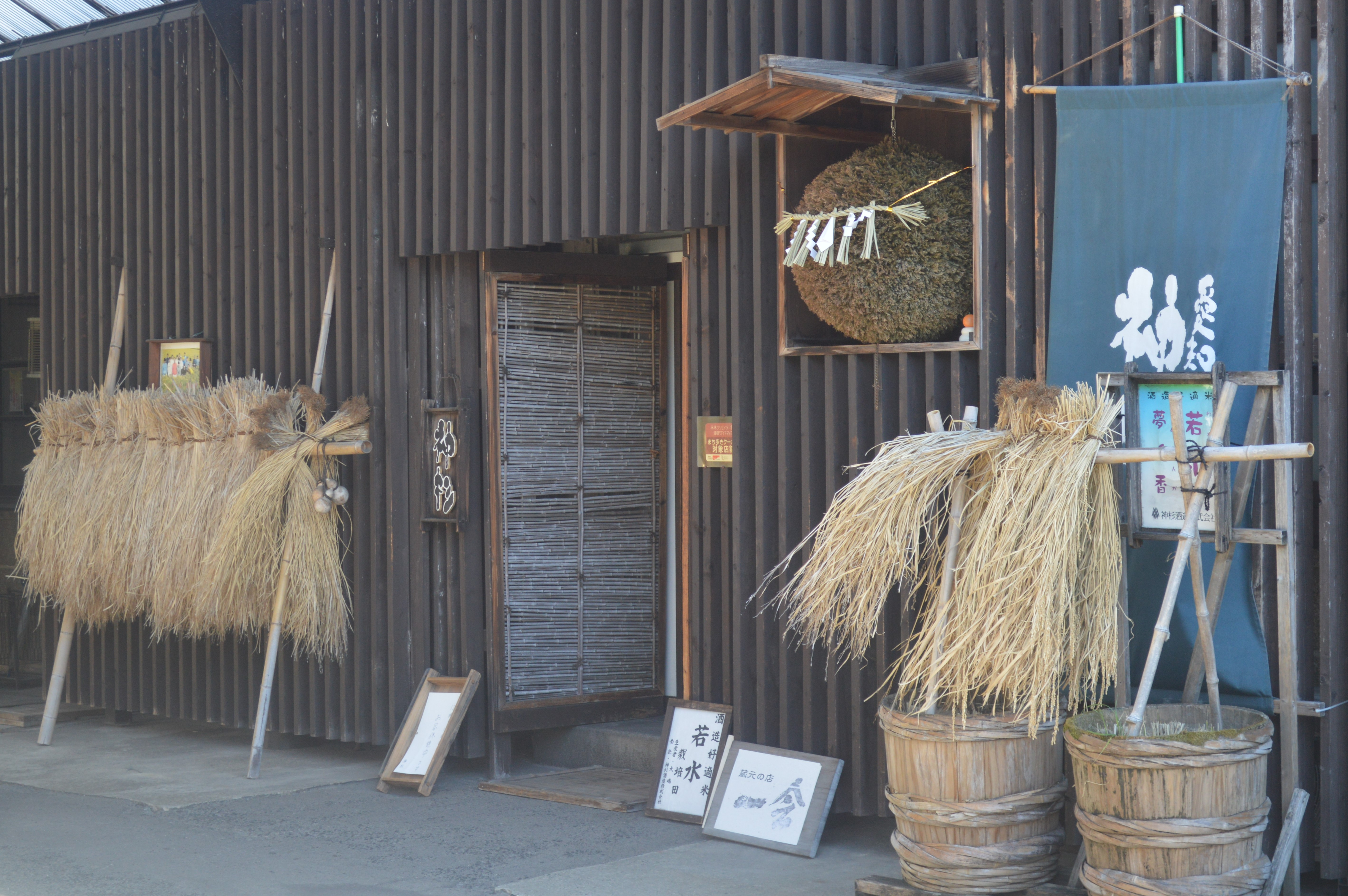 愛知県安城市にある神杉酒造株式会社。